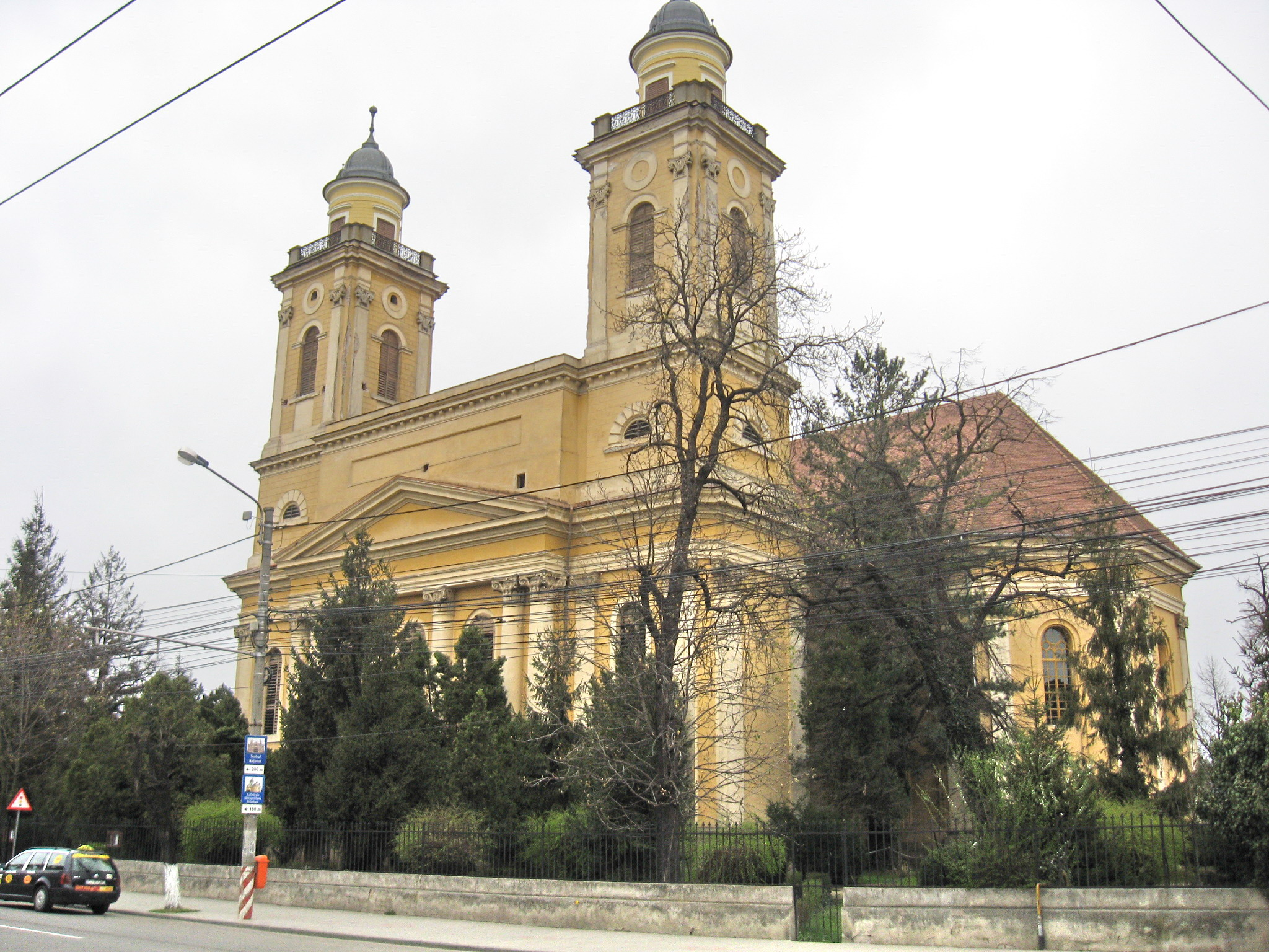 Cluj-Napoca, Biserica Reformată-Calvină din Orașul de Jos (Bulev. 21 Decembrie 1989 nr.41)